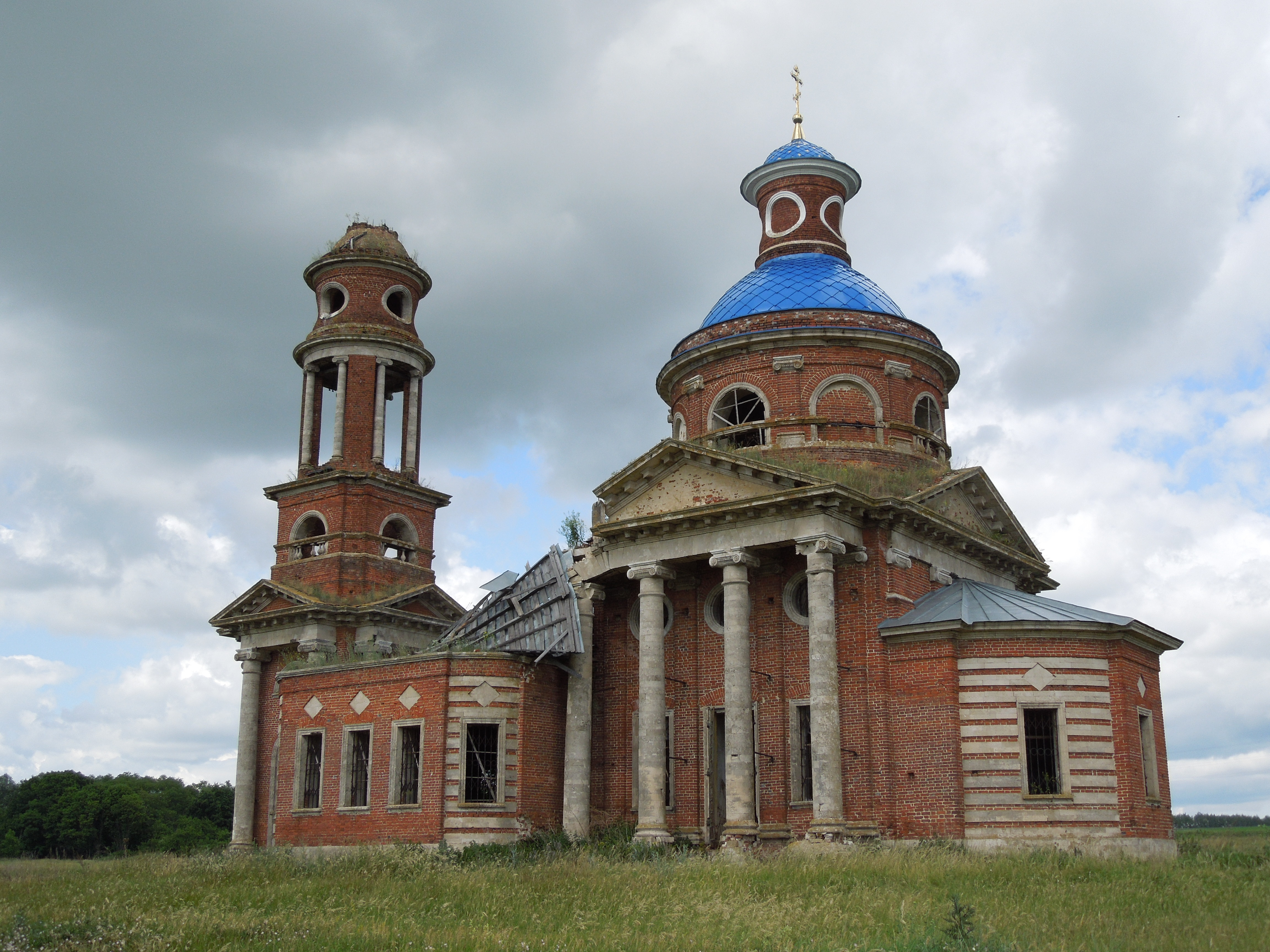 Знаменская церковь: Кузьминка, Лебедянский район, Липецкая область